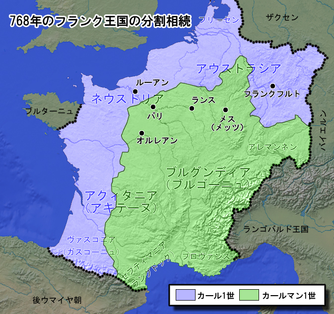 768年のフランク王国の分割相続。